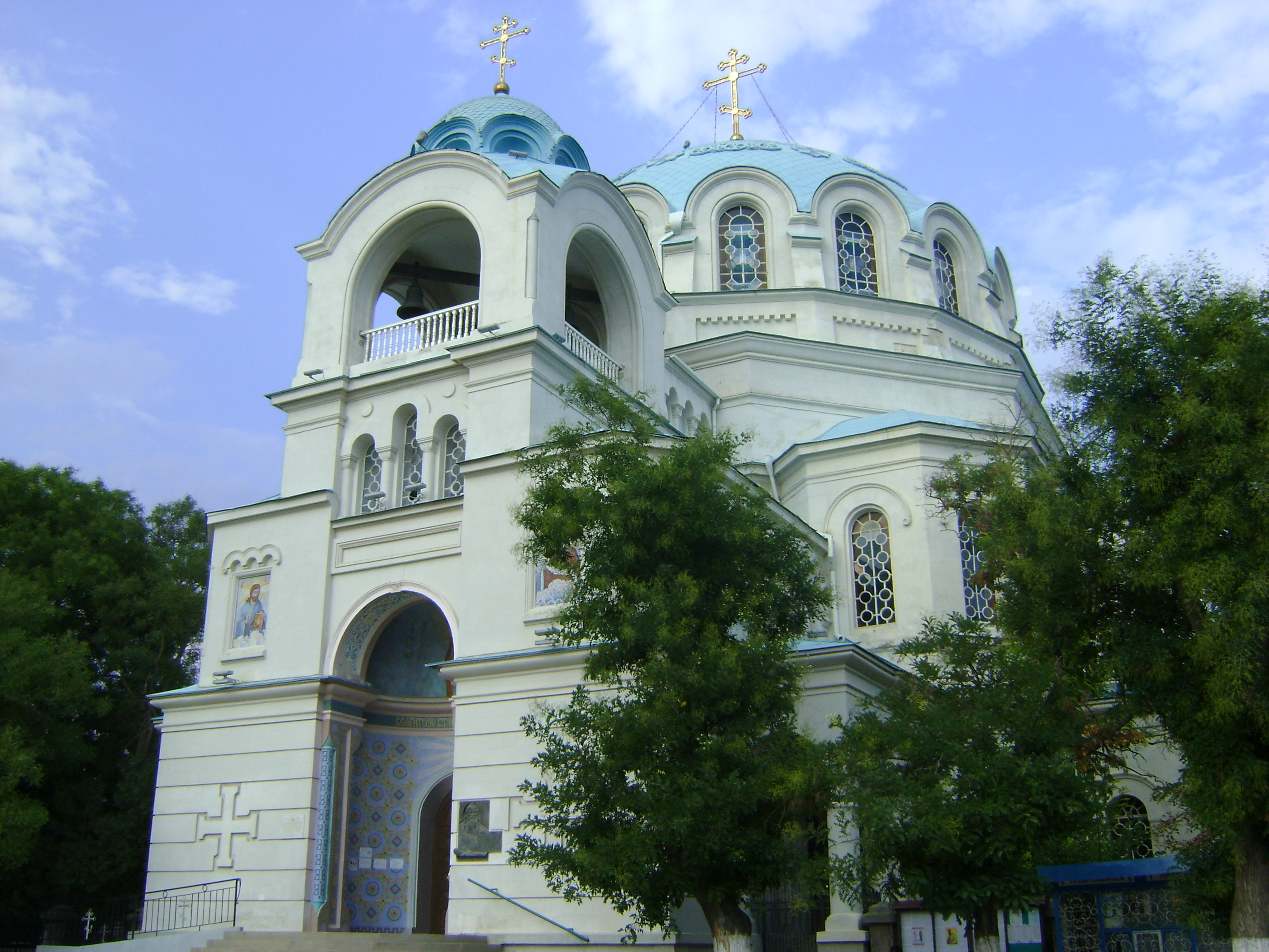 Належить УПЦ МП.